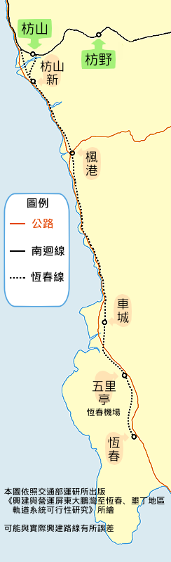 恆春線鐵路計劃路線圖與停靠車站。